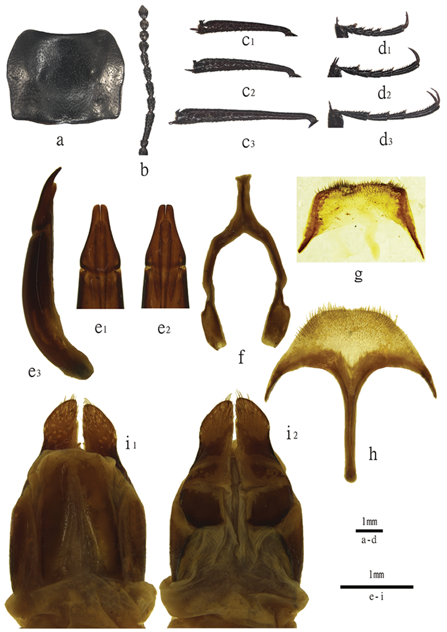 Figure 2; Characters of Blaptogonia zhentanga sp. n. a–g male: a pronotum b antenna c1–c3 pro-, meso, metatibia d1–d3 pro-, meso-, metatarsus e1–e3 aedeagus in dorsal, ventral, and lateral view f spiculum astrale g. abdominal sternite VIII h–i female: h Speculum ventrale in ventral view i1–i2 ovipositor in dorsal and ventral view.